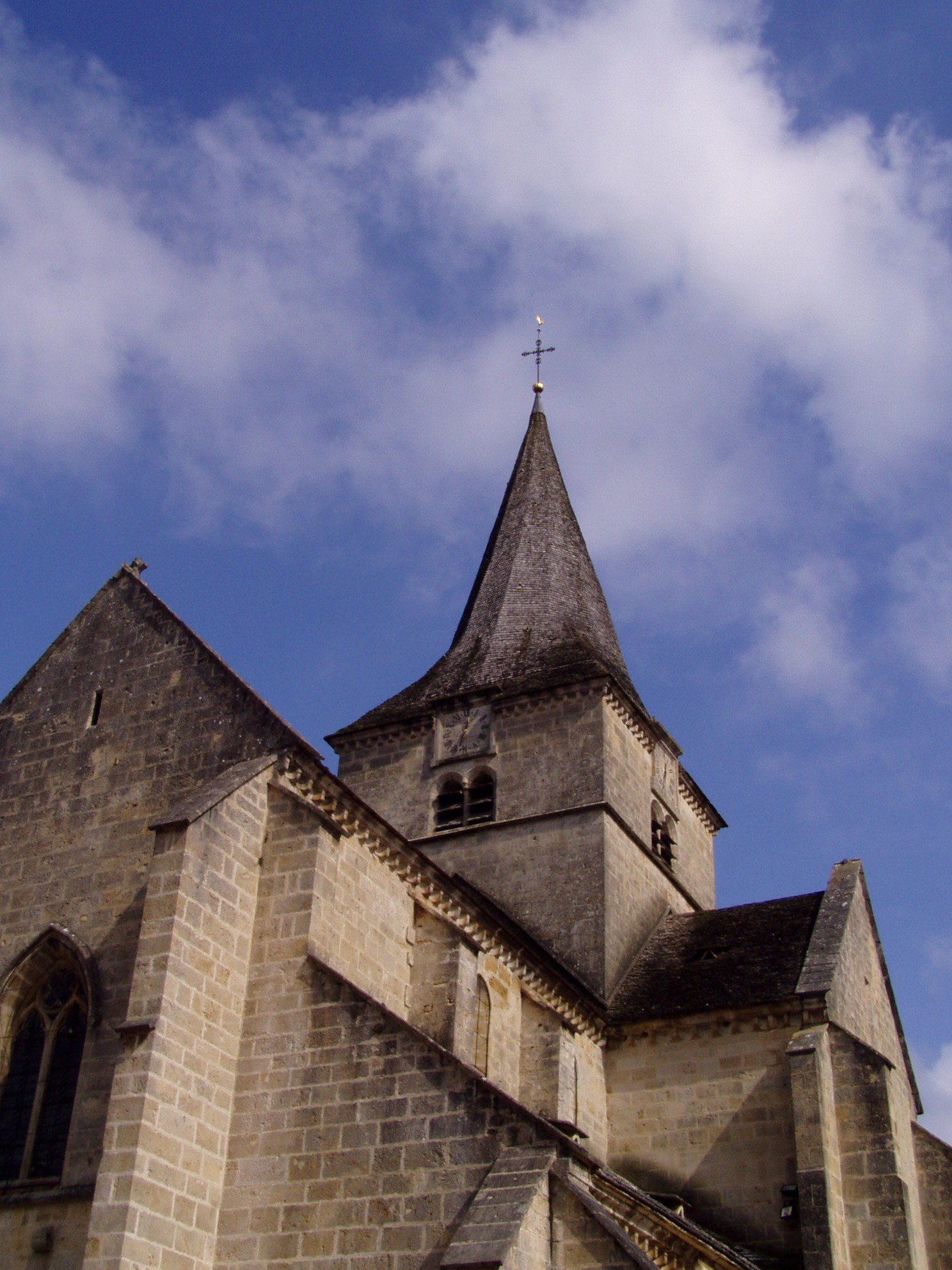 Clocher tors de l'église d'Aignay-le-Duc en Côte-d'Or